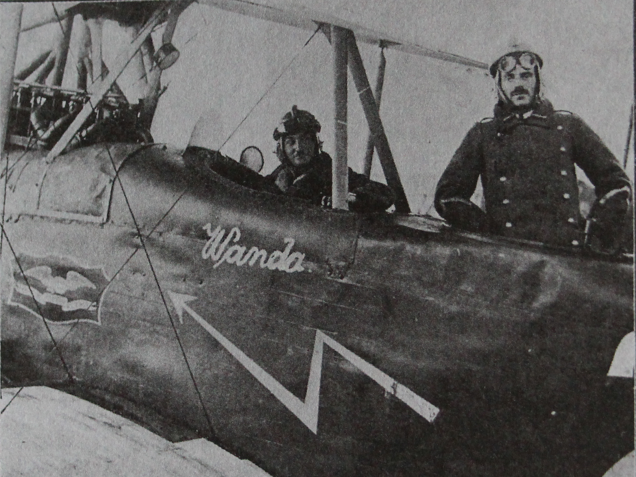 Lot bojowy d-cy 15 pułku ułanów płk Władysława Andersa; pilot sierżant Burzyński